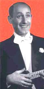 Jevel Katz (1902-1940), comediante y cantante judío nacido en Vilna, famoso entre la comunidad judía Argentina en la década de 1930.